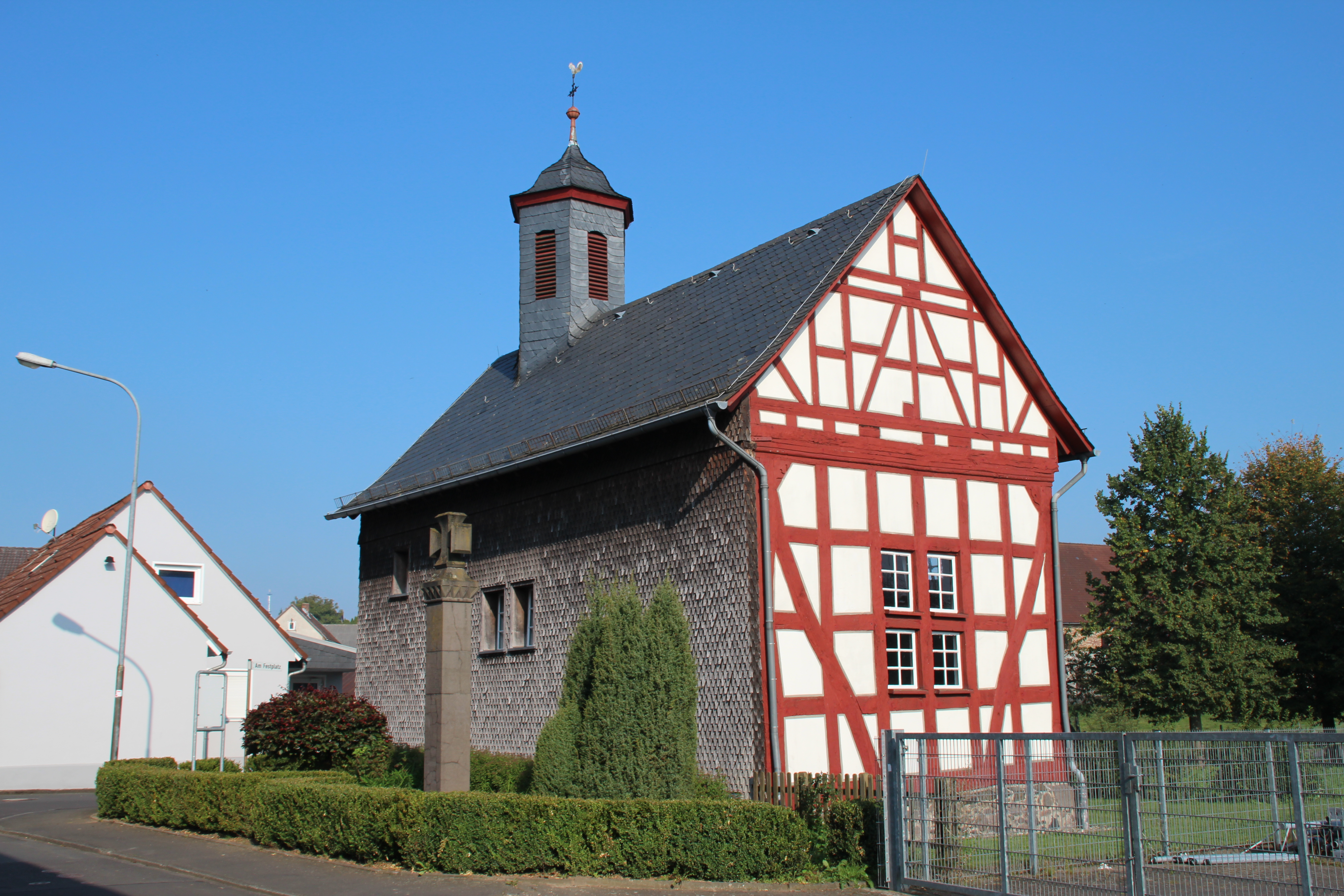 Evangelische Kirche Reinhardshain, Stadt Grünberg, Landkreis Gießen, Hessen, Deutschland